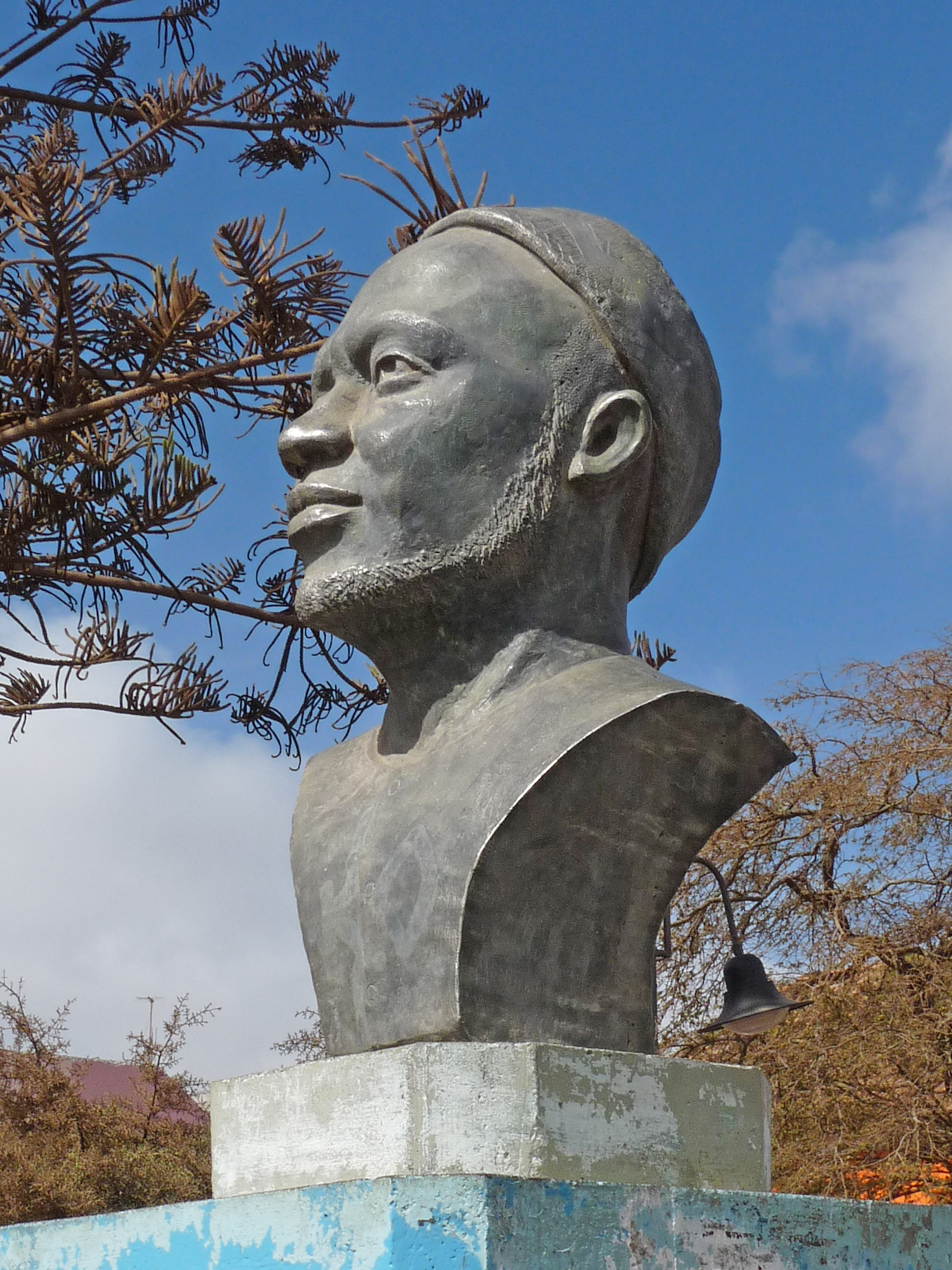 Assomada (île de Santiago, Cap-Vert) : monument à la mémoire d'Amílcar Cabral